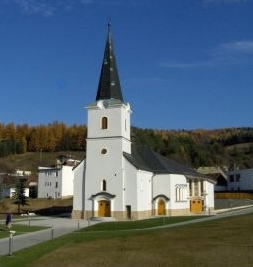 Kostol v obci Široké